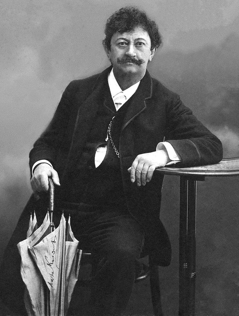 Laza Kostić (1841-1910)